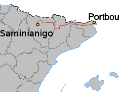 Mapa de l'eix Pirinenc (N-260)